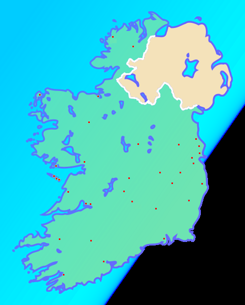 Aerodromes_Eire_2007.PNG